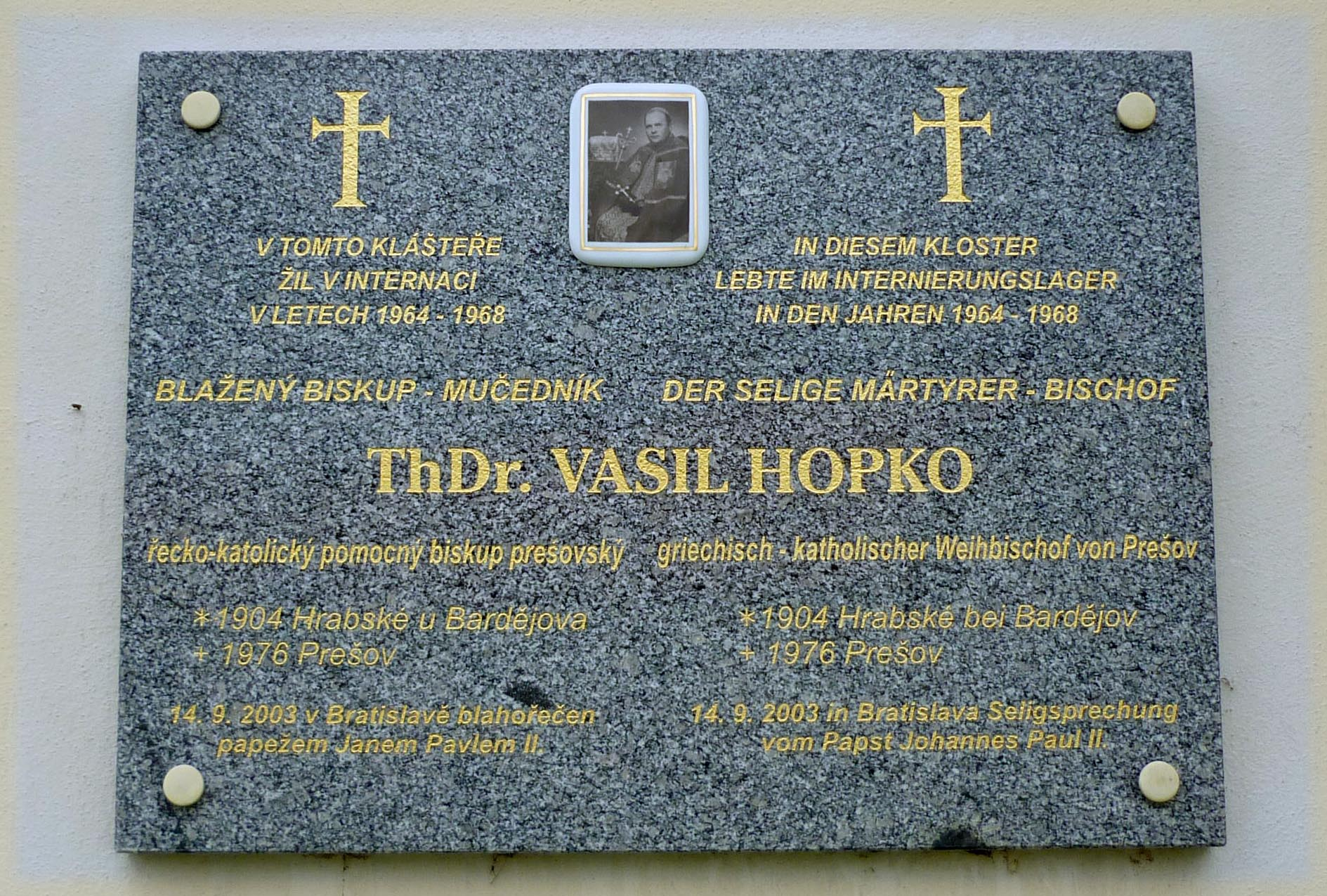 Gedenktafel an das Internierungslager im Kloster Ossegg / Osek